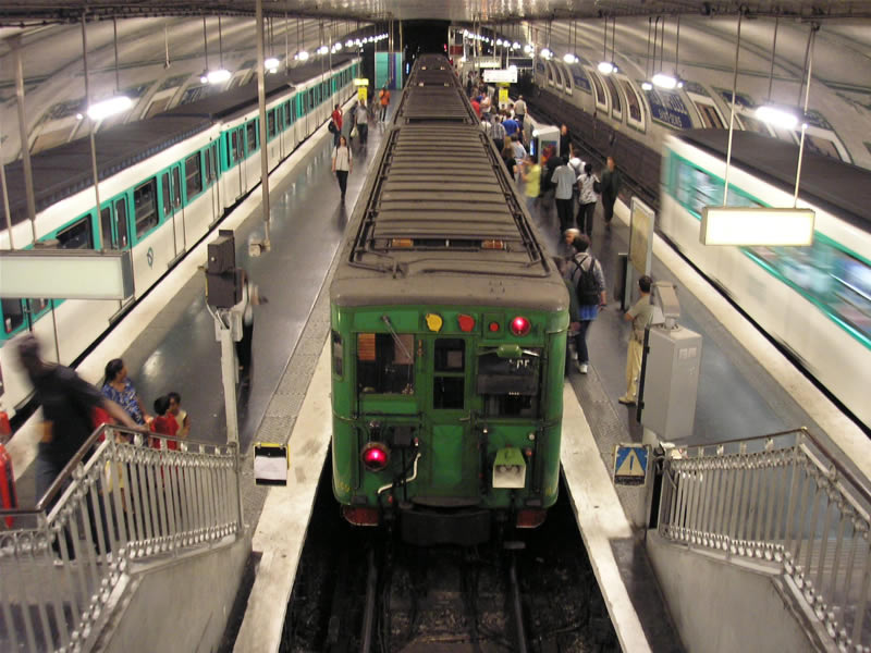 Rame Sprague-Thomson à Porte de La Chapelle à l'occasion d'une circulation spéciale sur la ligne 12.